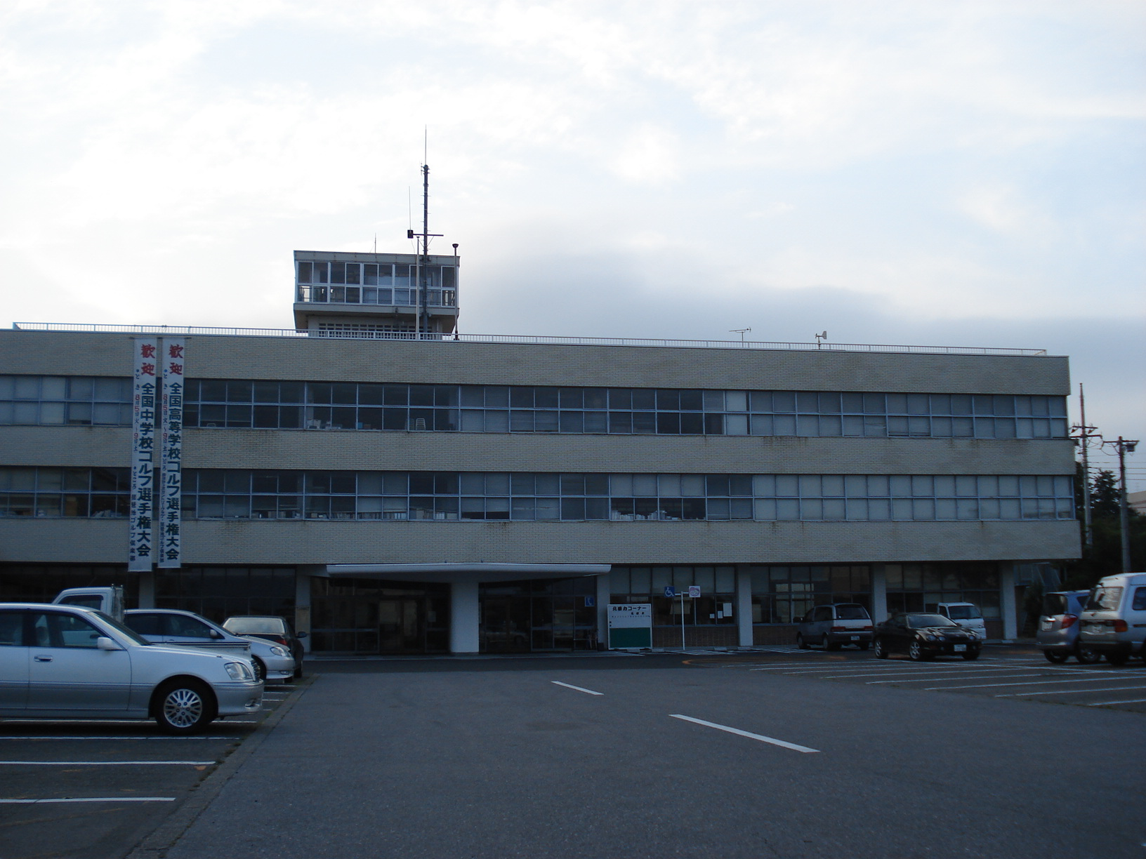 栃木県大田原市役所本庁舎